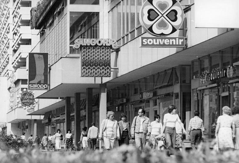 Berlin, Leipziger Straße, Ladenstraße ADN-ZB Kaufhold 13.5.81 Berlin: Die hochsommerlichen Temperaturen locken viele Besucher in die Leipziger Straße.